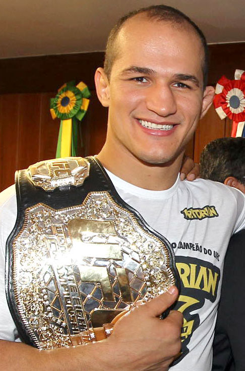 Junior Cigano durante recepção feita pelo governador da Bahia.